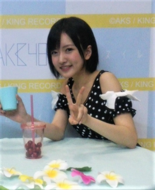 AKB48「サムネイル」劇場盤発売記念 大写真会